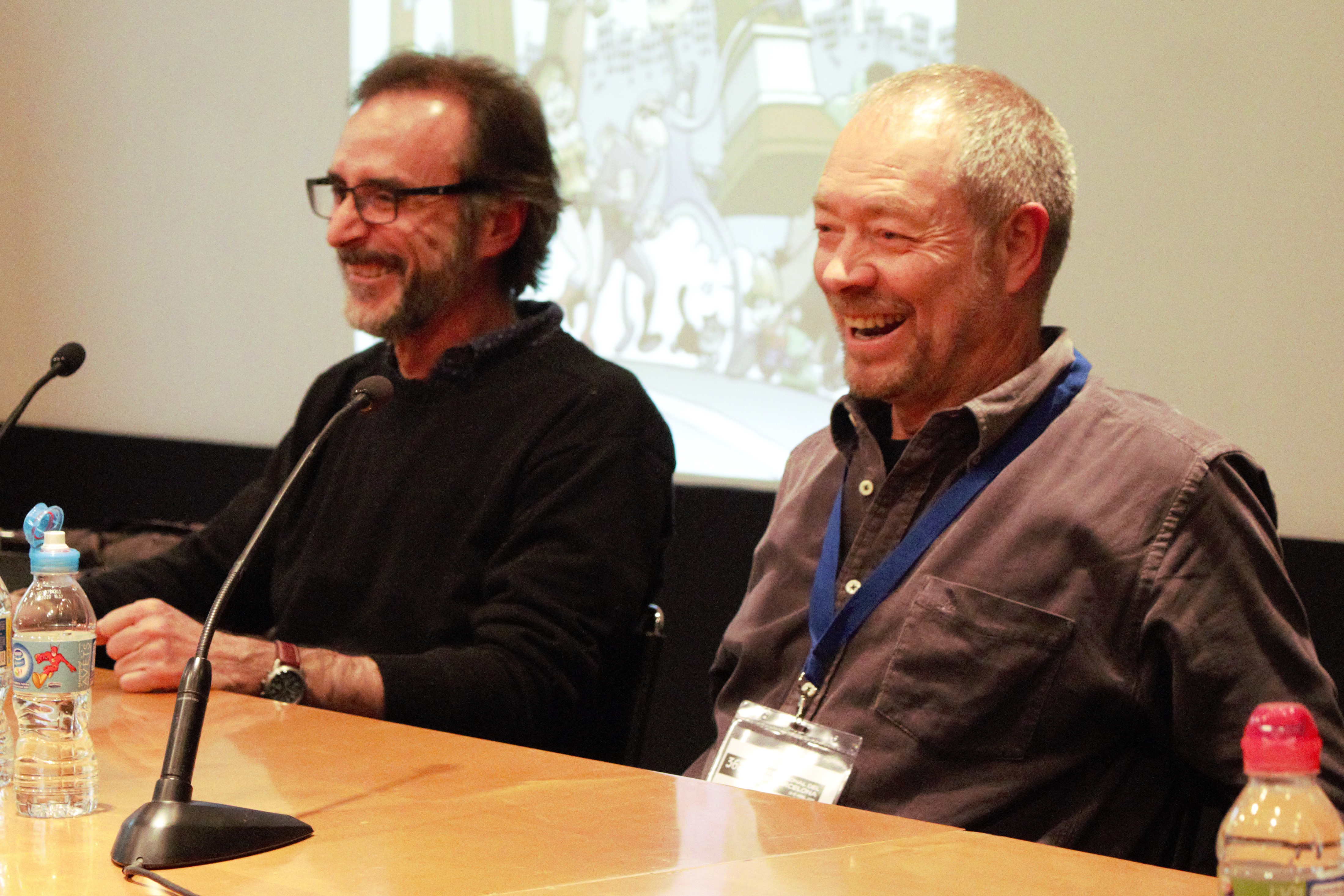 "Trobada am Rubén Pellejero. Presenta: Pepe Gálvez". Entretinguda i amicable conversa entre el dibuixant de còmics Rubén Pellejero i el guionista i dibuixant Pepe Gálvez . Dissabte 12 d'abril de 2018. Saló del Còmic de Barcelona de 2018.